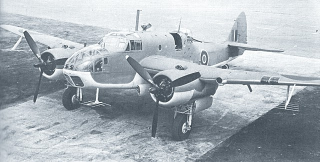 Beaufort Mark II